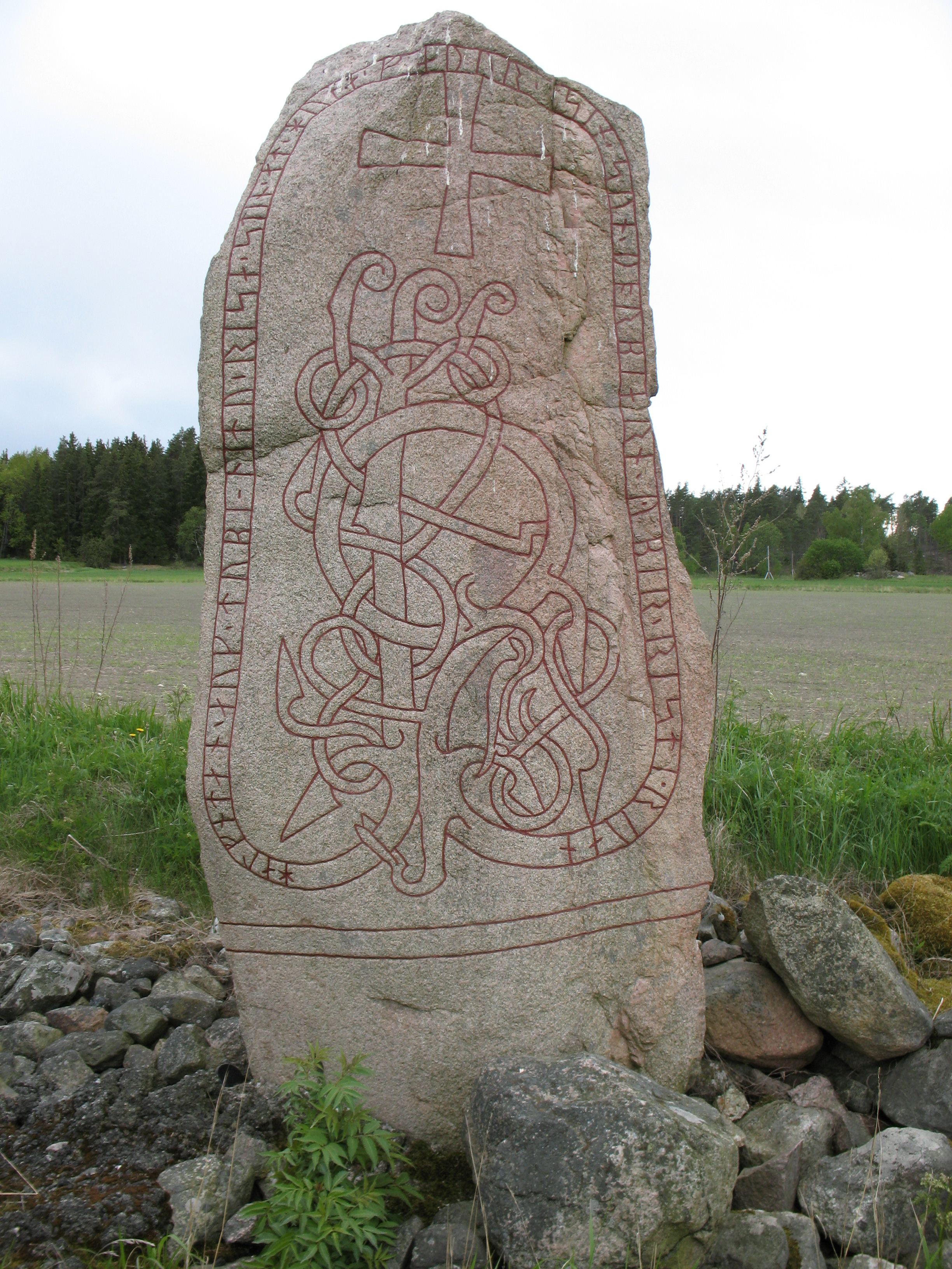 runestone U 229 in Gällsta, Vallentuna.